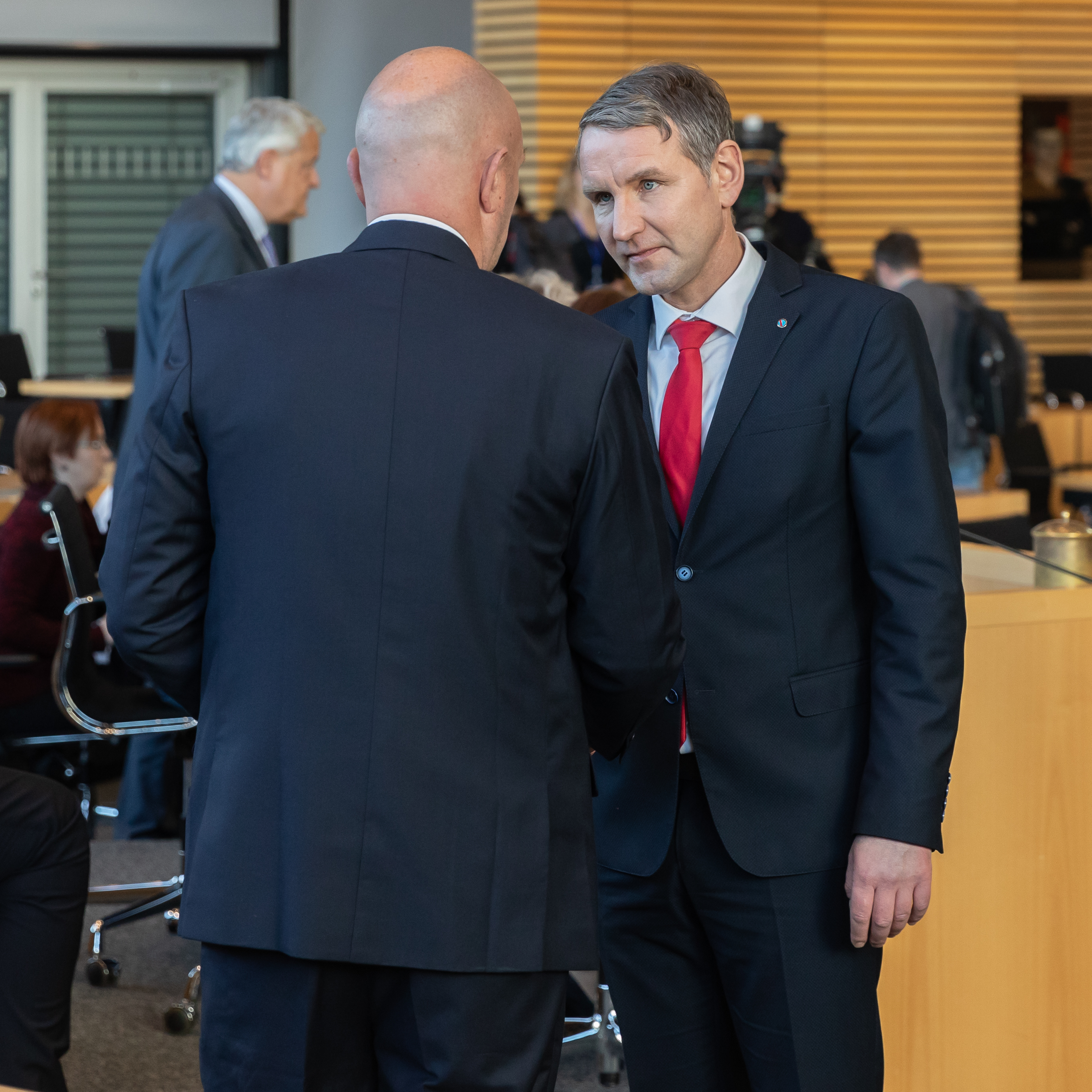 Thüringer Landtag, Wahl des Ministerpräsidenten: Björn Höcke (AfD, Fraktionsvorsitzender und Landessprecher der AfD Thüringen) gratuliert Thomas L. Kemmerich (FDP, Landes- und Fraktionsvorsitzender in Thüringen) zur Wahl